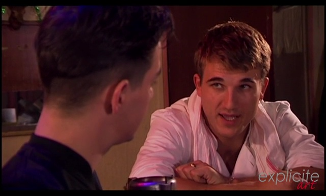 Sebastian Barrio et Titof (de dos) dans une scène du film "XYZ" de John B. Root